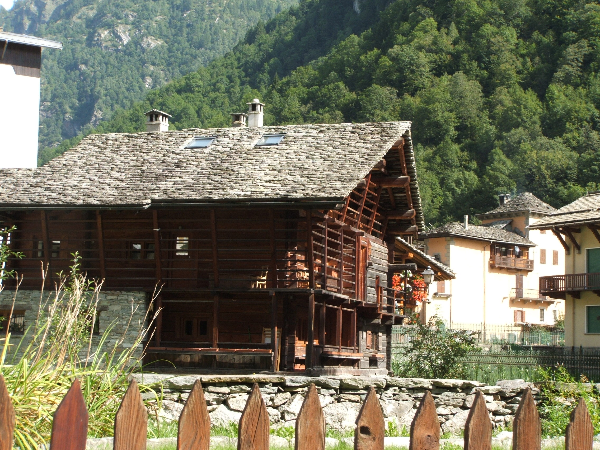 Casa in stile Walser ad Alagna Valsesia, Piemonte, Italia.